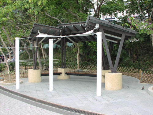 中文（香港）: 瀑布灣公園